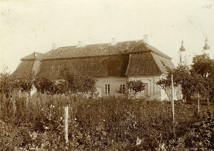 Беларуская (тарашкевіца): Слонім (Słonim), Замосьце (Zamoście)